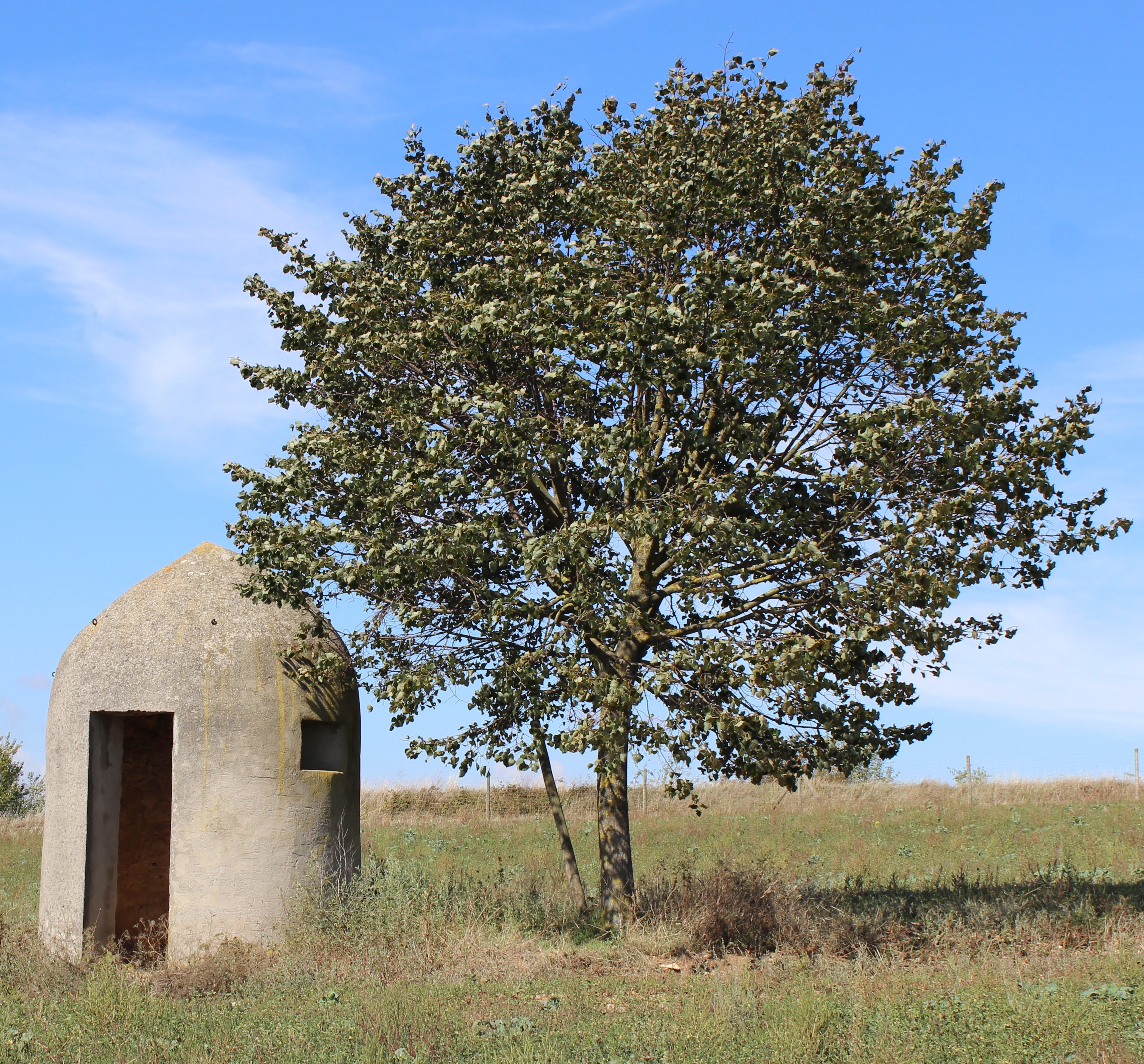 Wingertshäuschen (Weinberghäuschen) nördlich des Dorfes Rüssingen.